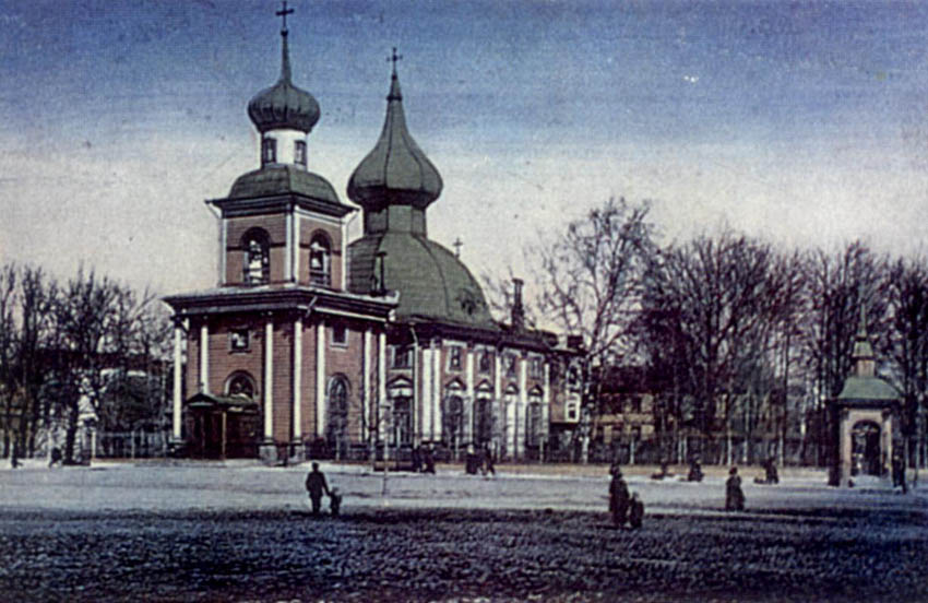 Троицкий собор на Троицкой площади (Троице-Петровский собор)